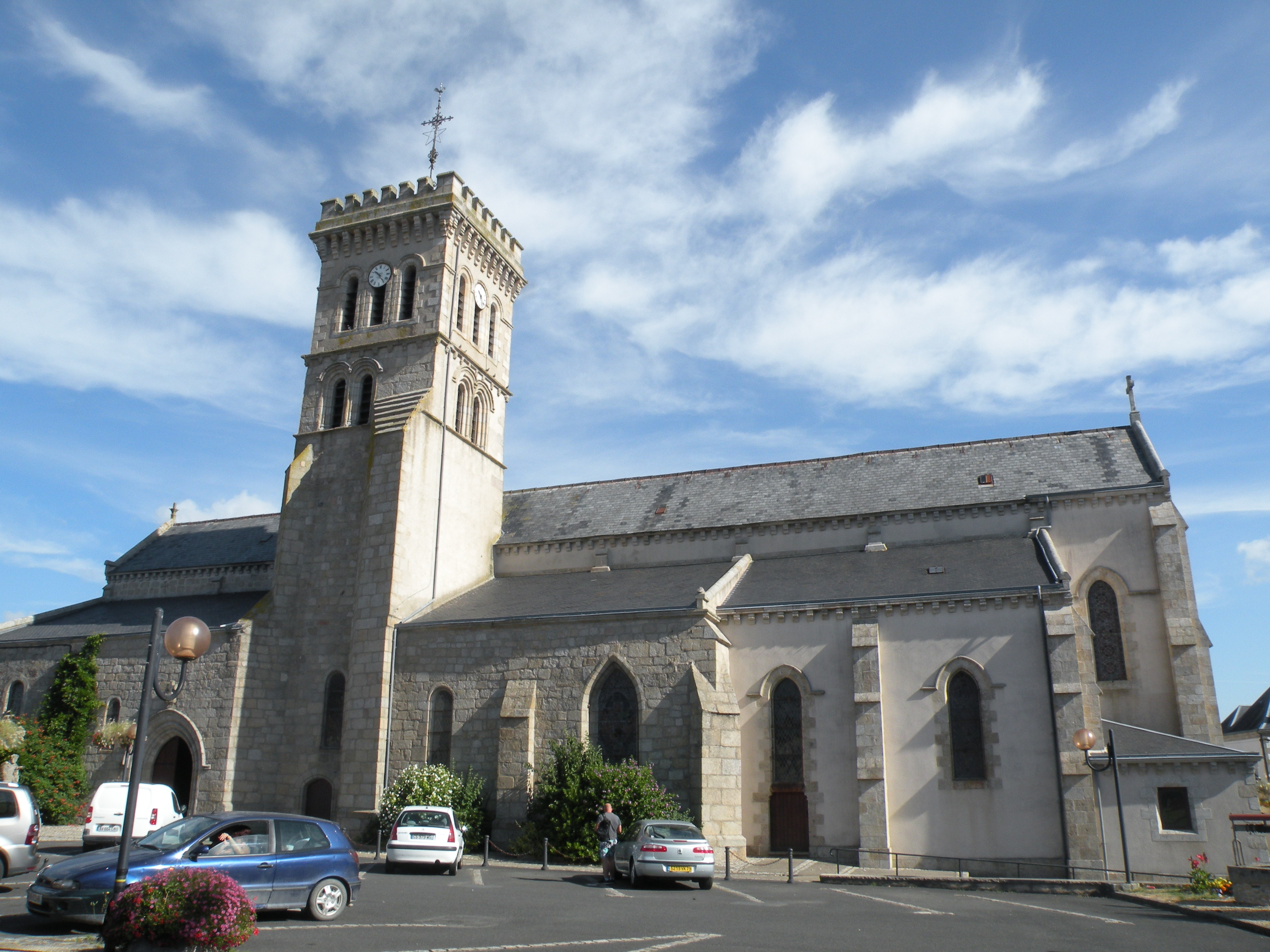 Église Saint-Laurent de La Chapelle-Saint-Laurent